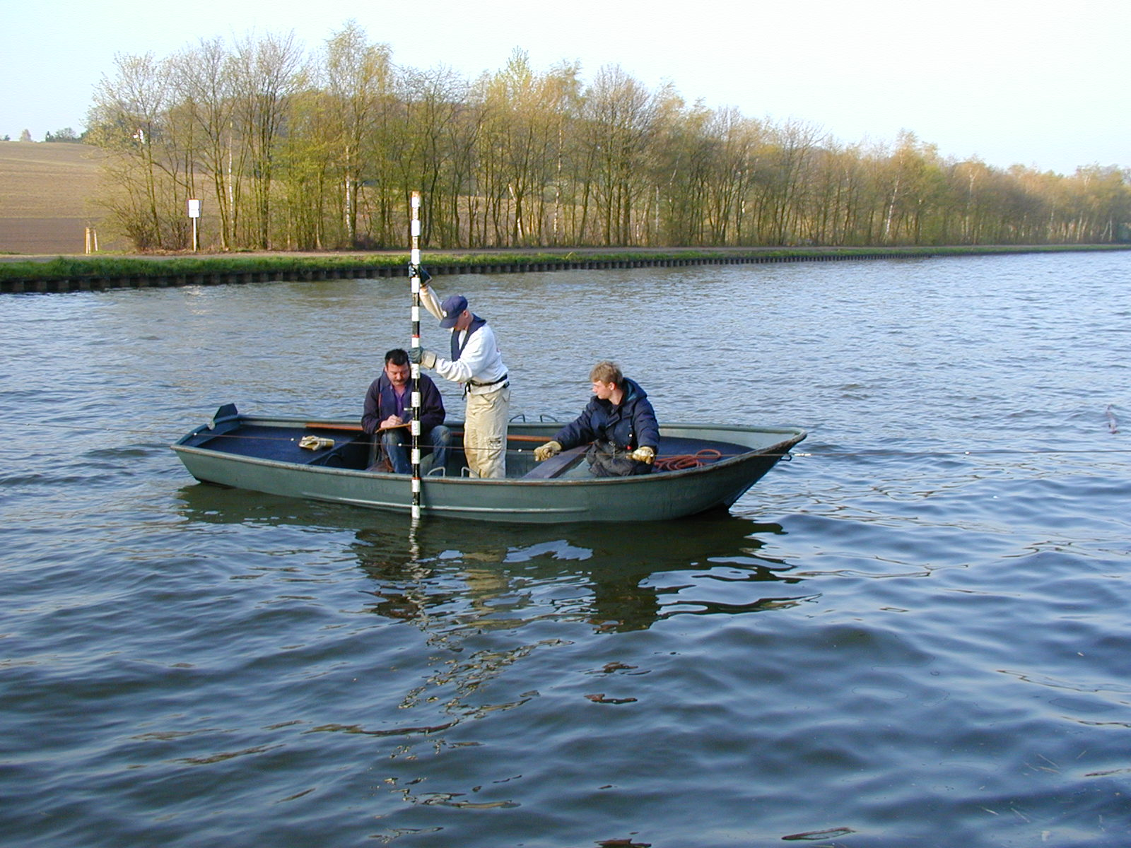 Stangenpeilung mit Peilstange und Peildraht